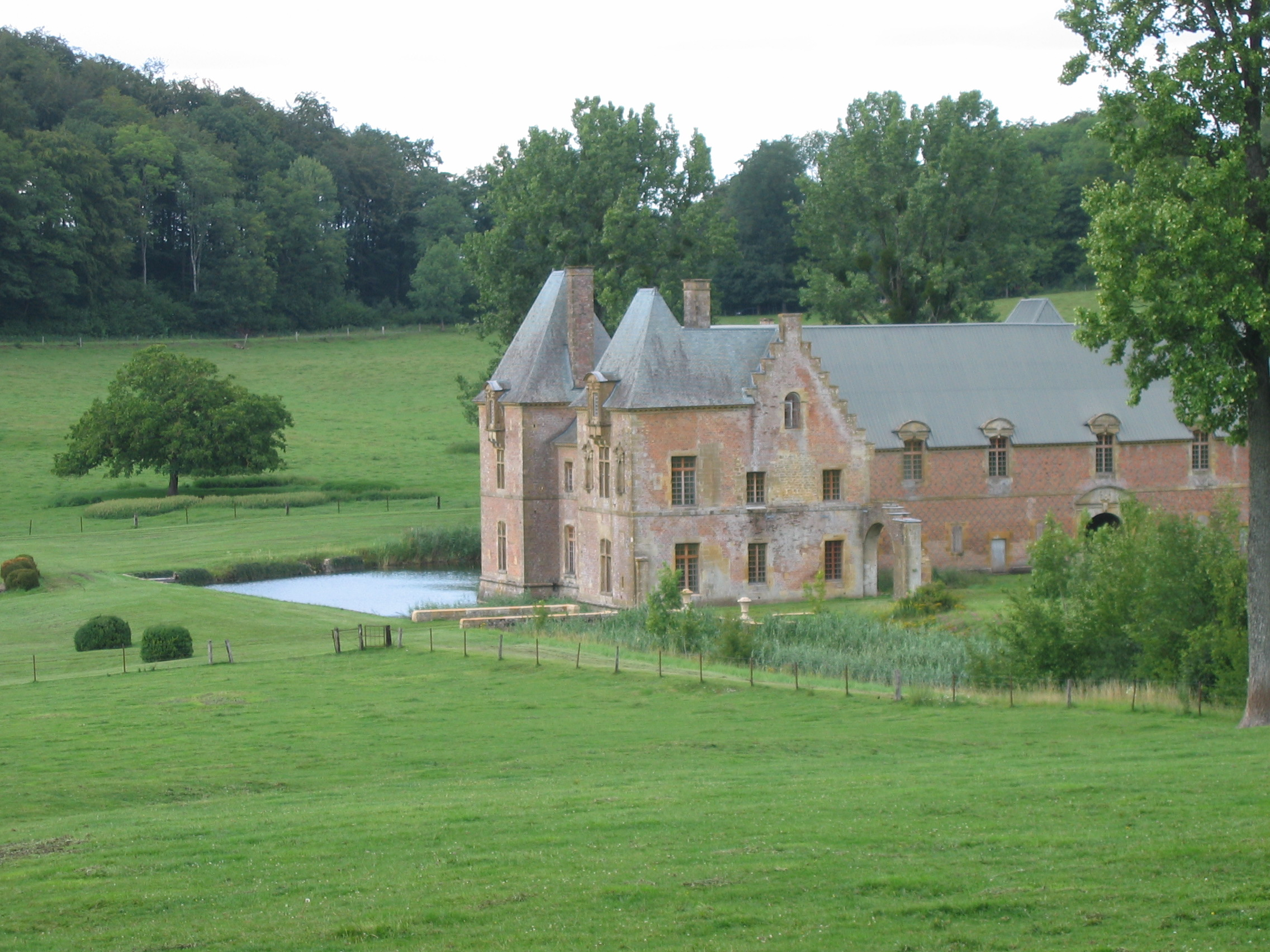 grand corps de logis de la Chartreuse du Mont-Dieu, Ardennes, France